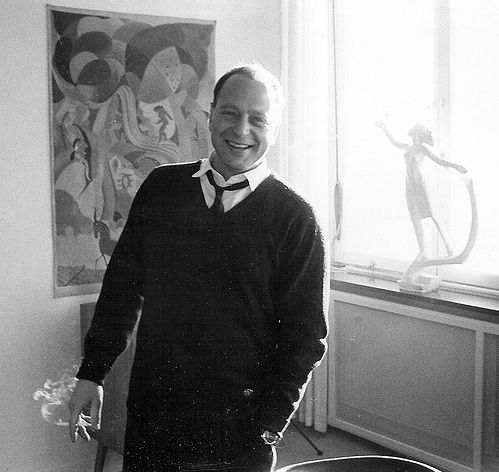 Lukas Bonnier